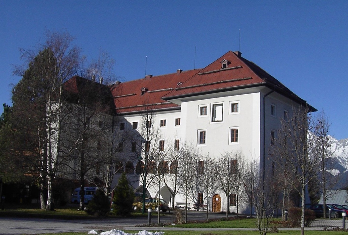 Schloss Farmach in Saalfelden, Salzburg